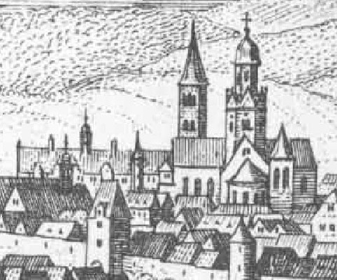 Stiftskirche mit dem Vierungsturm und dem einen Westturm, der heute noch steht